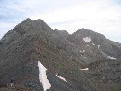 Pico Espadas visto desde el Pico Pabots o Tucón Royo Esta imagen ha sido tomada personalmente por Avh